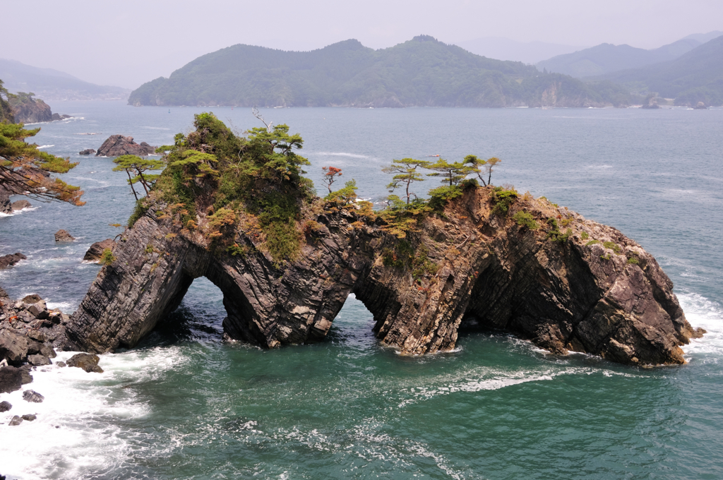 碁石海岸・穴通磯。